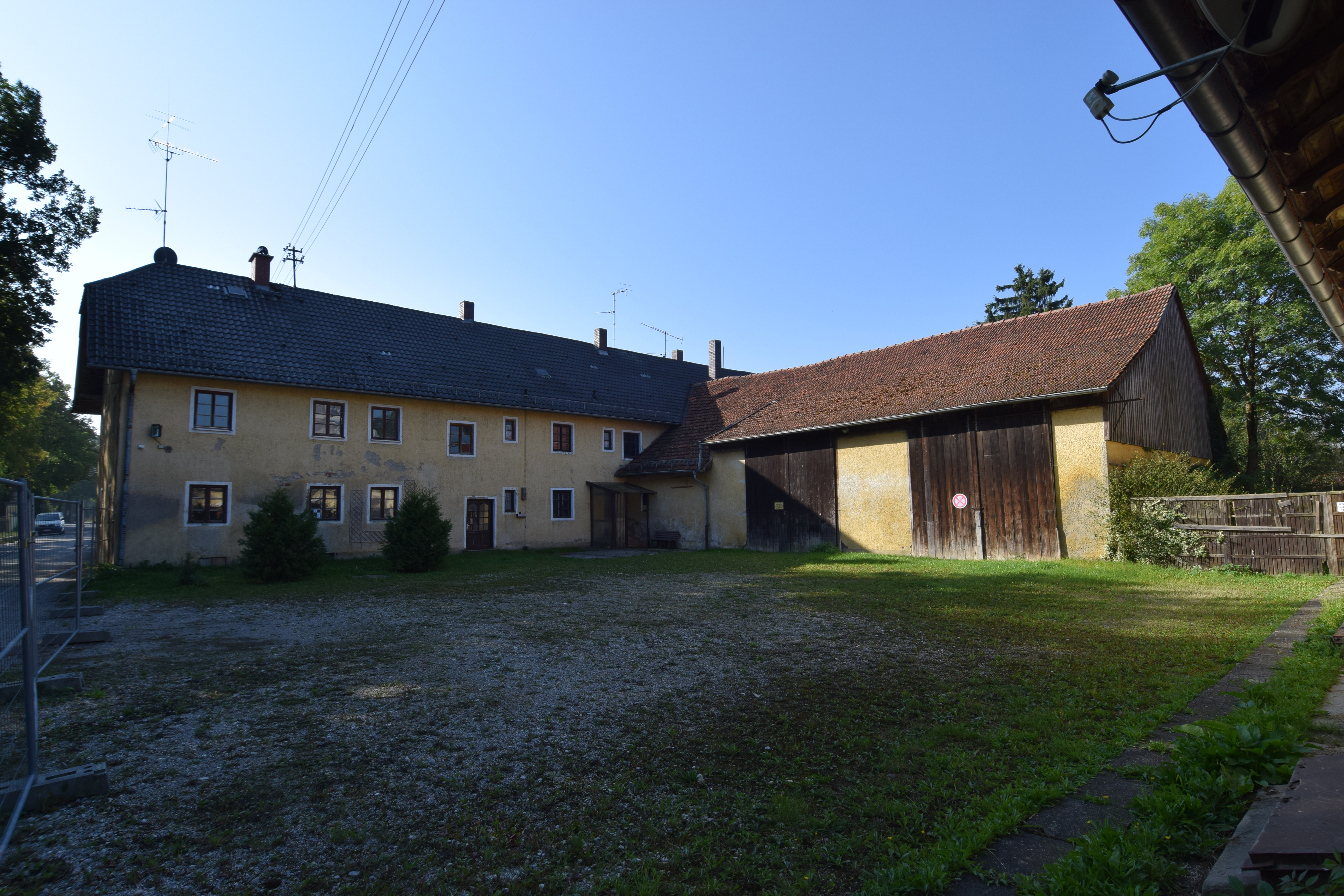 Südlicher Wirtschaftshof in Gut Freiham, Blick von Norden auf das "Gärtnerhaus" und den angrenzenden Stadel